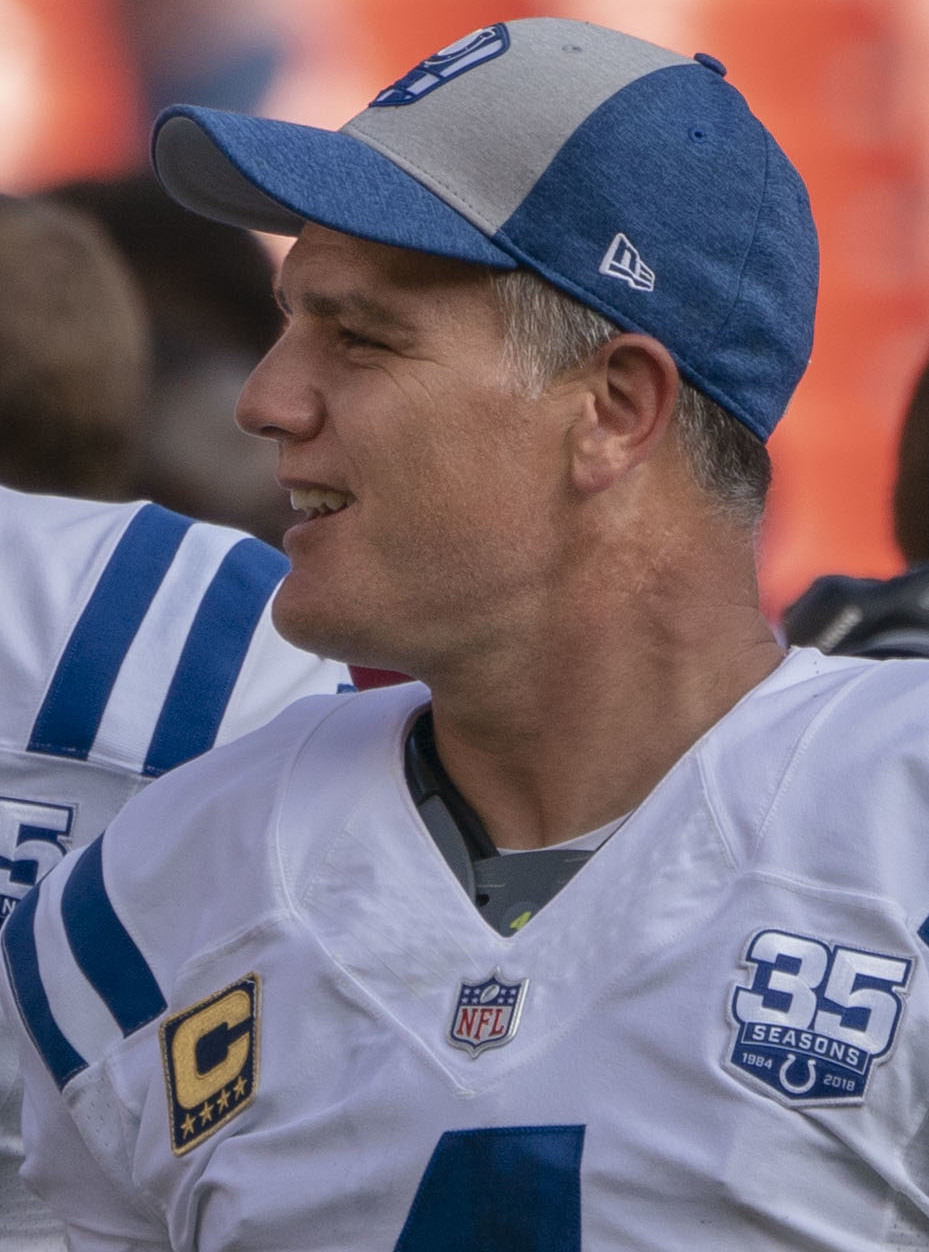 Colts at Redskins 09/16/18